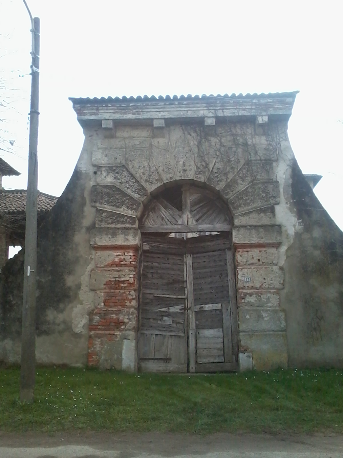 Il portale del palazzo Doria Borromeo Medici a Fagnano, Gaggiano (MI) - Italy